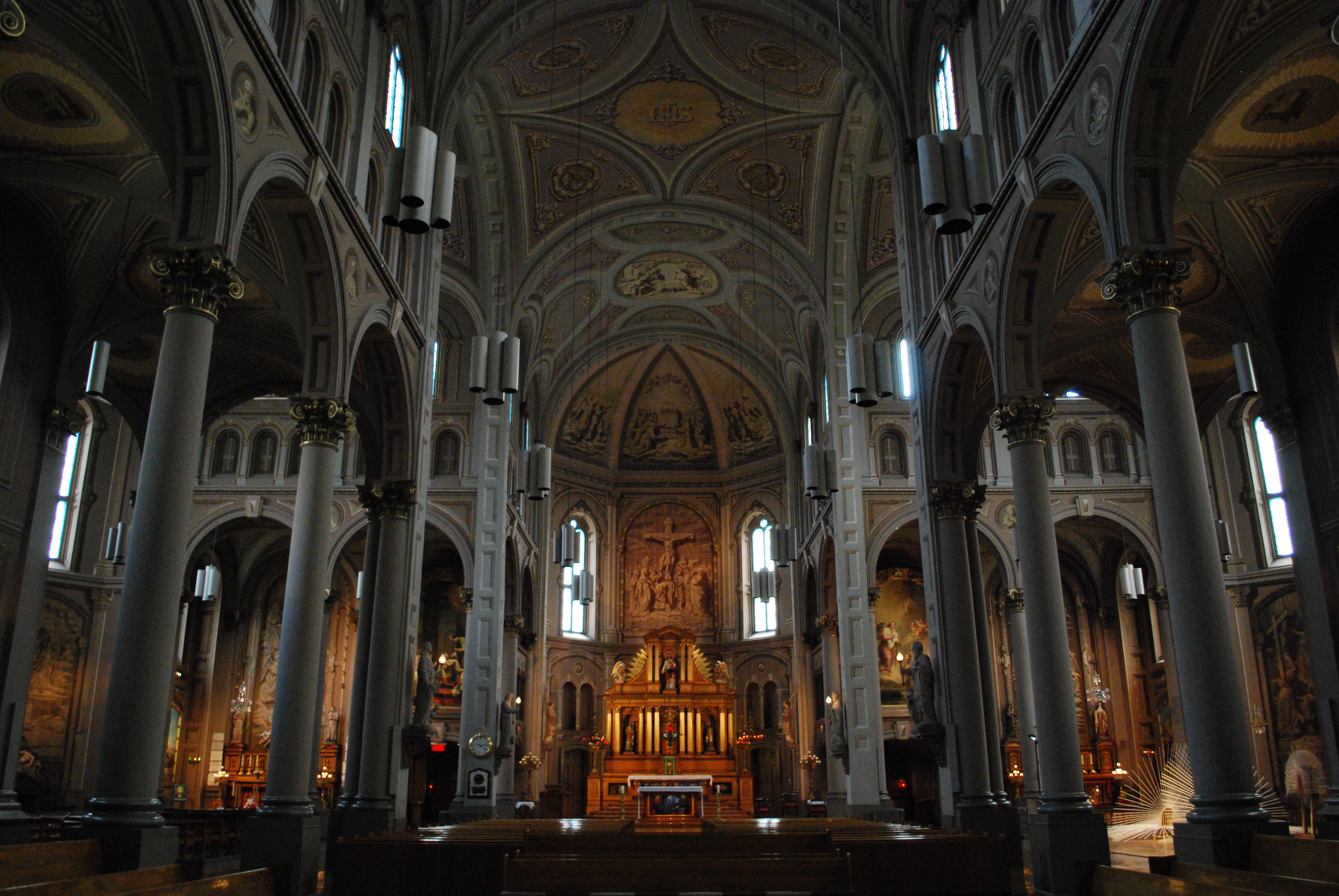 Intérieur de l'église du Gesù à Montréal.